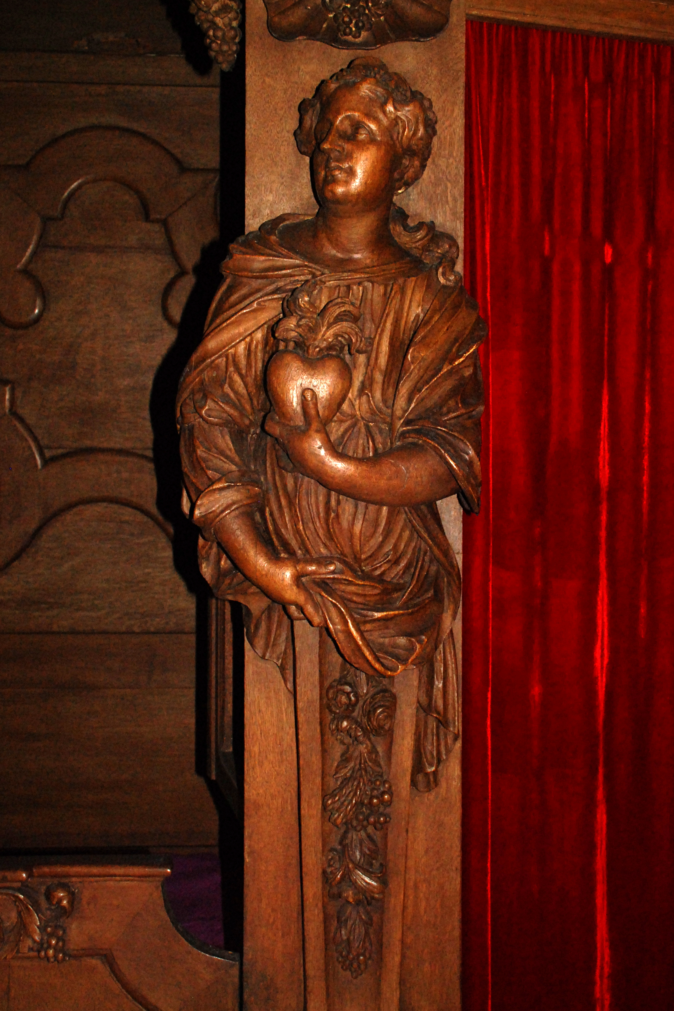 Belgique - Brabant wallon - Ottignies - église Saint-Rémi - confessionnal : la Foi